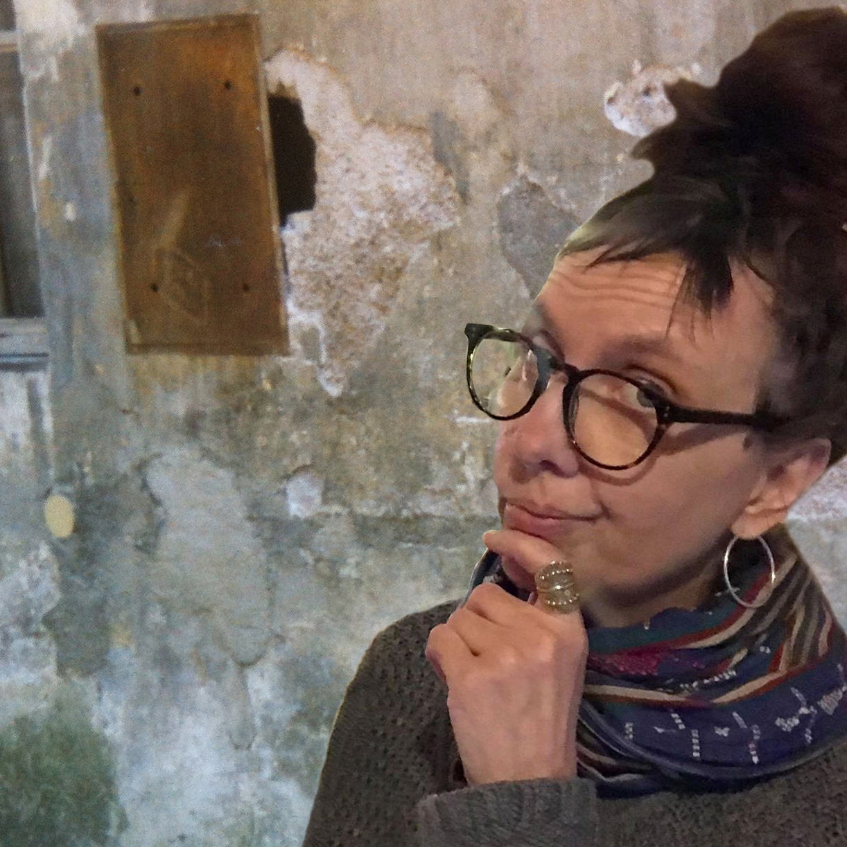 Författare Sina Nilsson Bassell